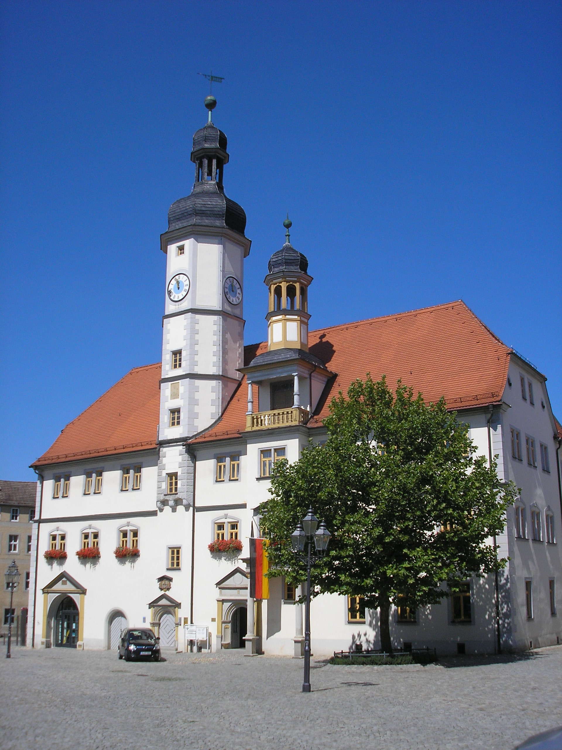 Rathaus von Eisenberg (Thüringen).